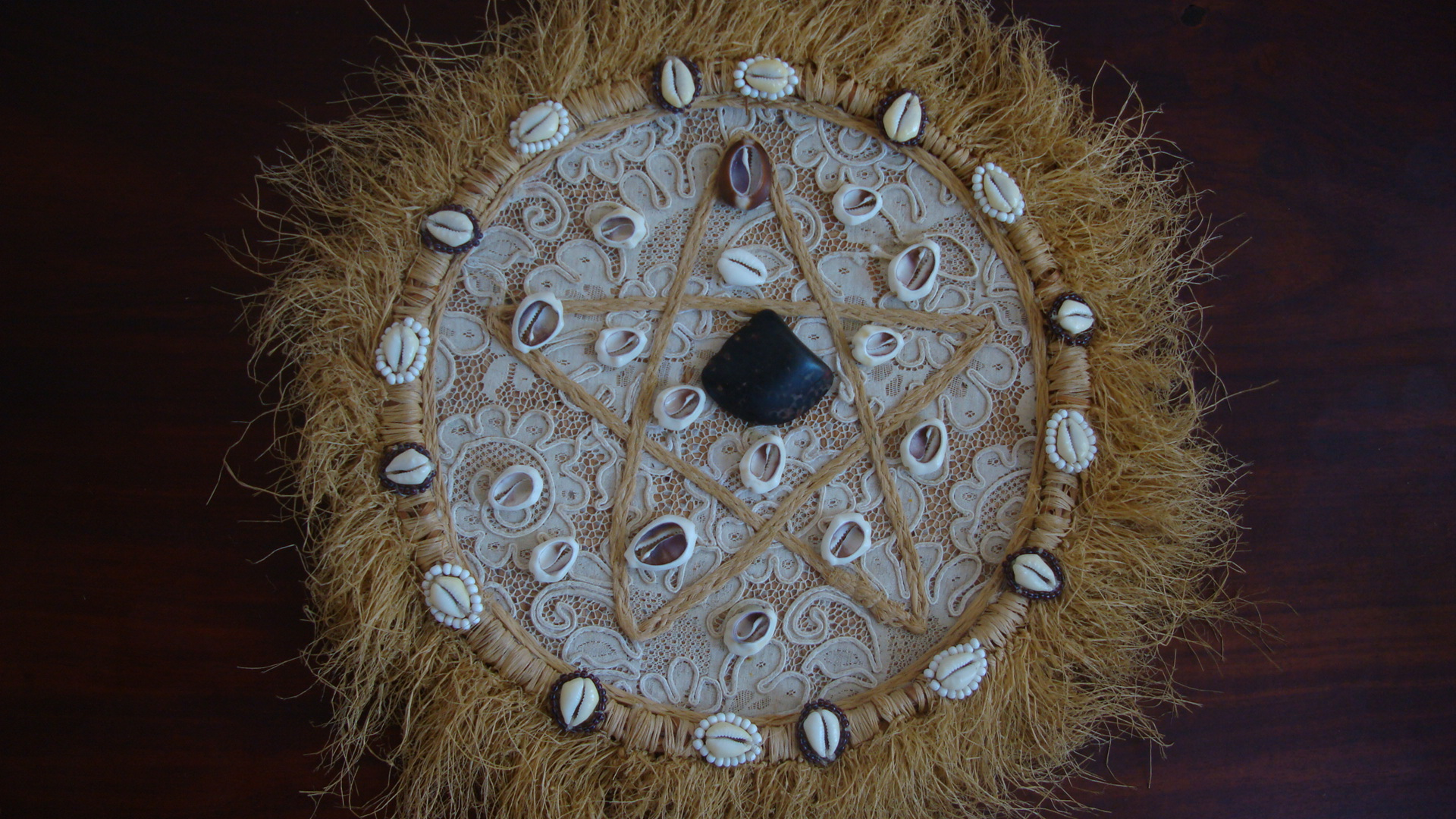 Um búzio aberto, significa Odu Okaran no Merindilogun, Candomblé, Salvador, Bahia